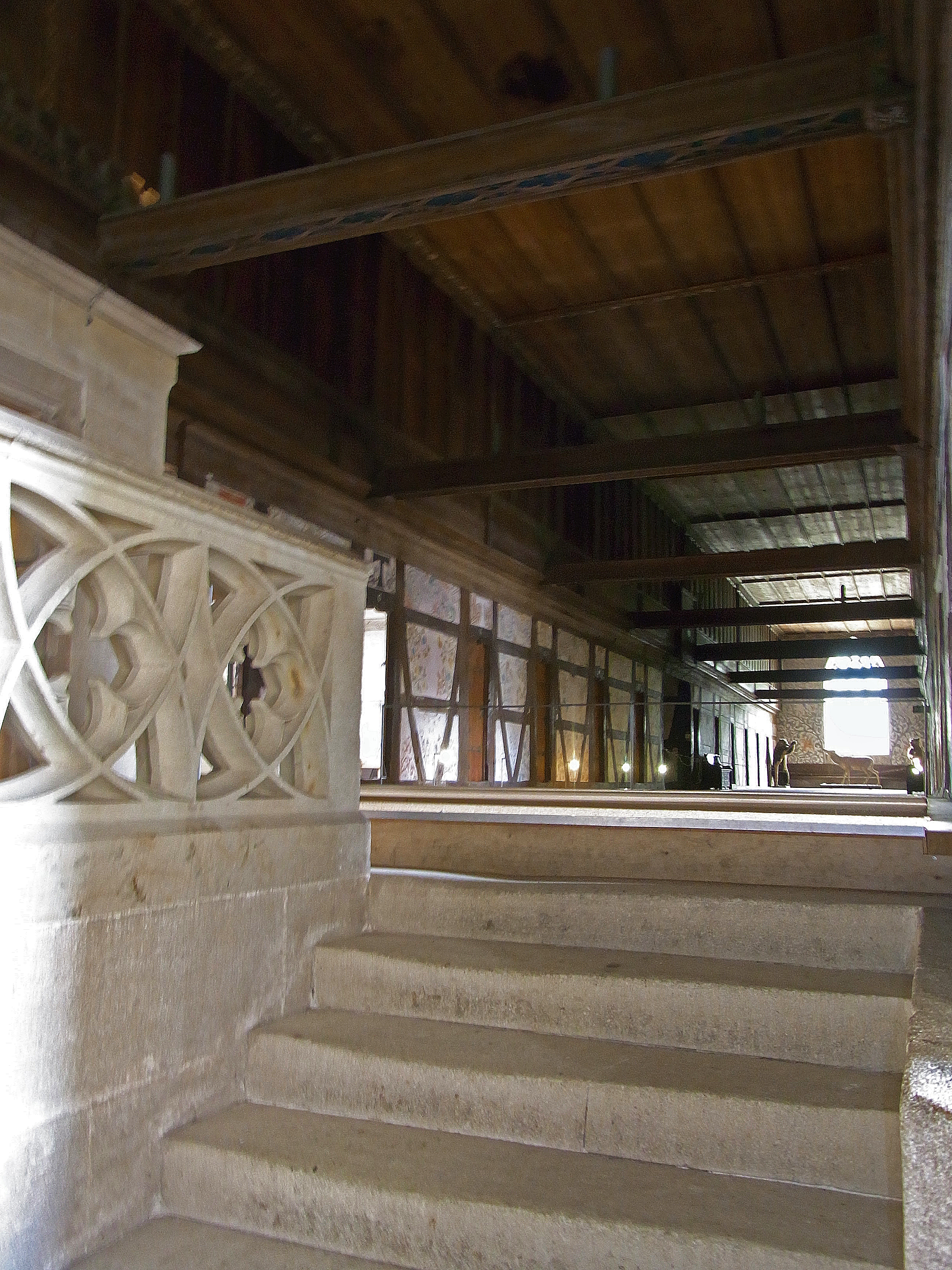 Kloster Bebenhausen: Dormitorium